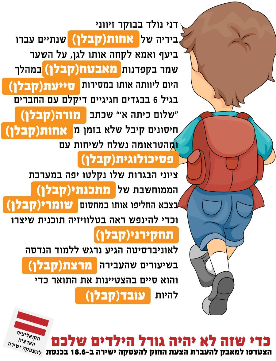 קמפיין נגד העסקת עובדי קבלן, הקואליציה הארצית להעסקה ישירה.